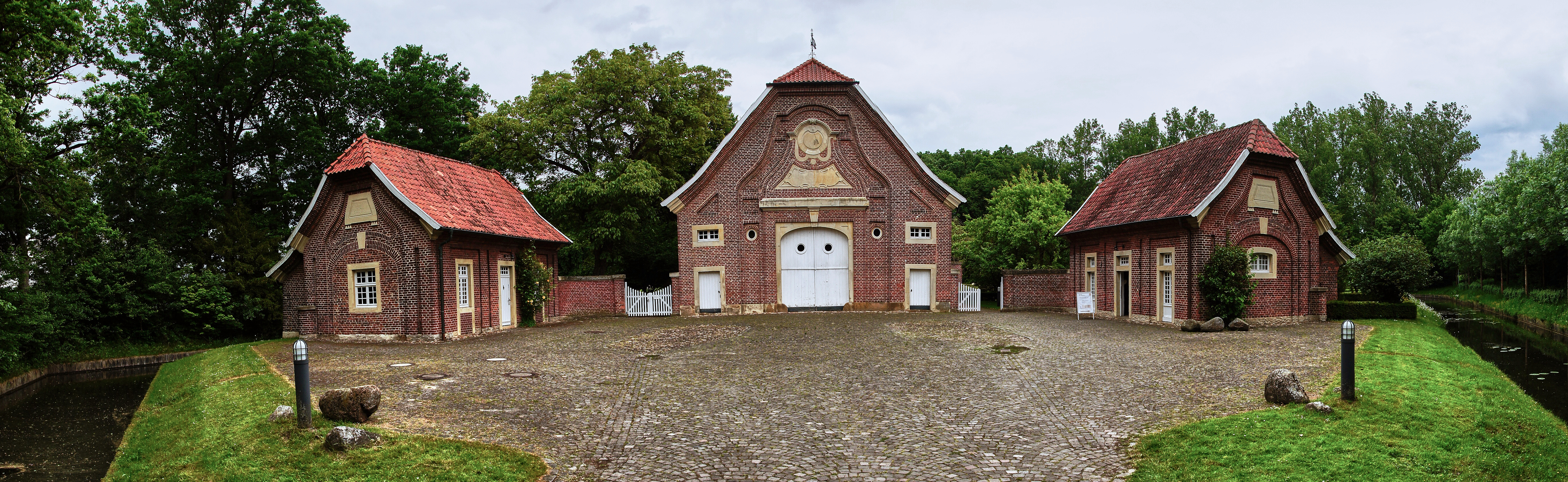 Das von 1745 bis 1748 nach Entwürfen von Johann Conrad Schlaun erbaute Rüschhaus in Nienberge im westfälischen Münster war zeitweise Wohnsitz von Annette von Droste-Hülshoff. This is a photograph of an architectural monument.It is on the list of cultural monuments of Münster (Westfalen)